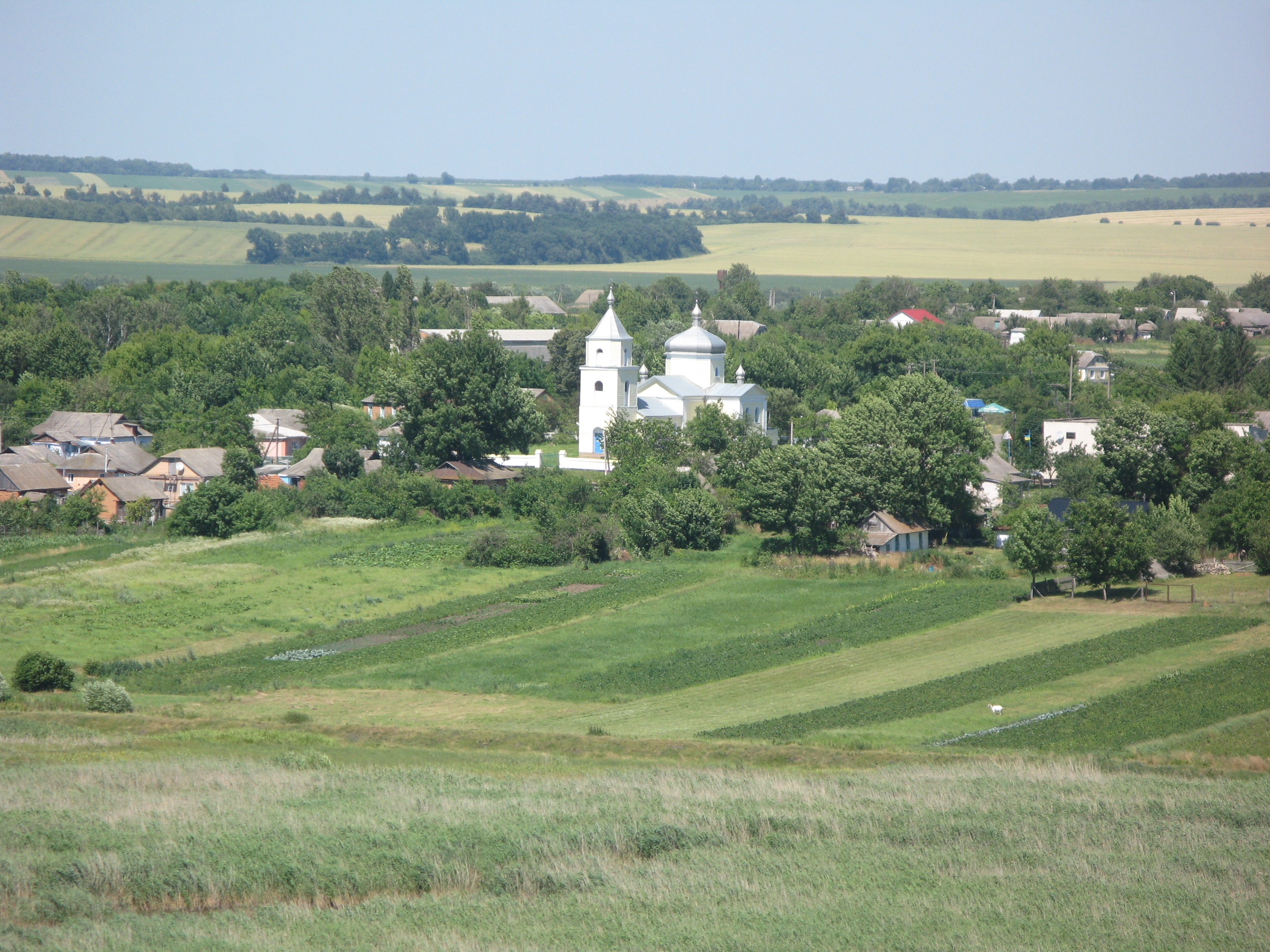 Церква Святого Дмитра, село Ставниця